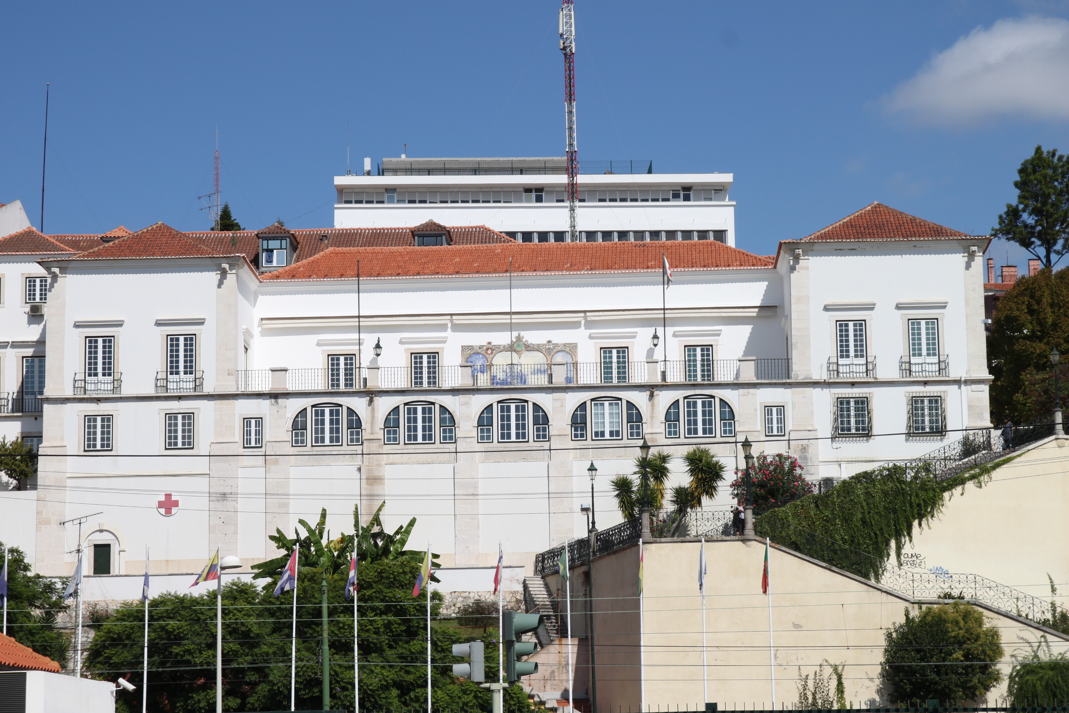 Palácio do Conde de Óbidos (onde está instalada a Cruz Vermelha Portuguesa) This file was uploaded for Wiki Loves Monuments in Portugal with the unique identifier 74272.